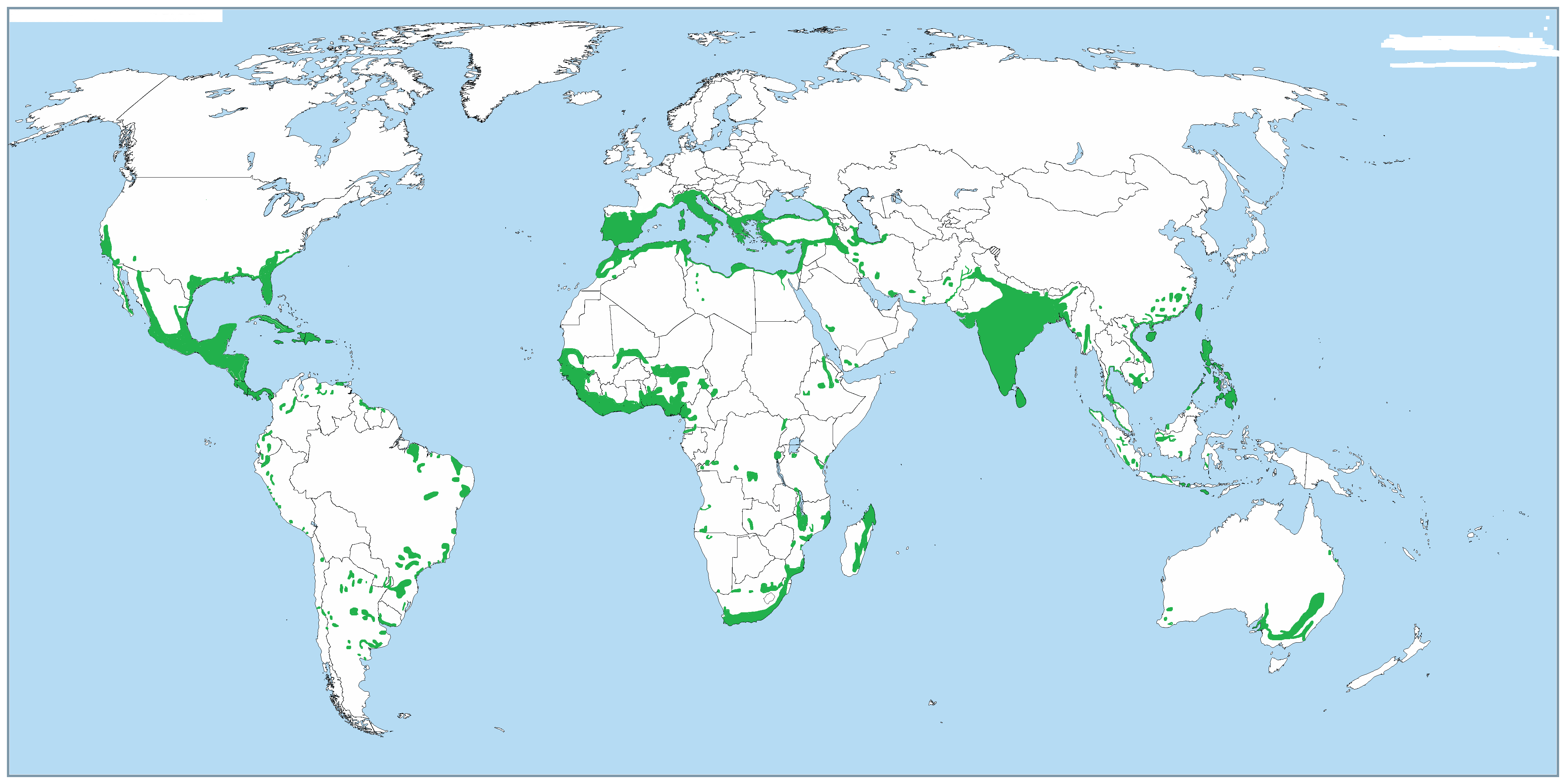 Ареал(выращивание) Апельсина